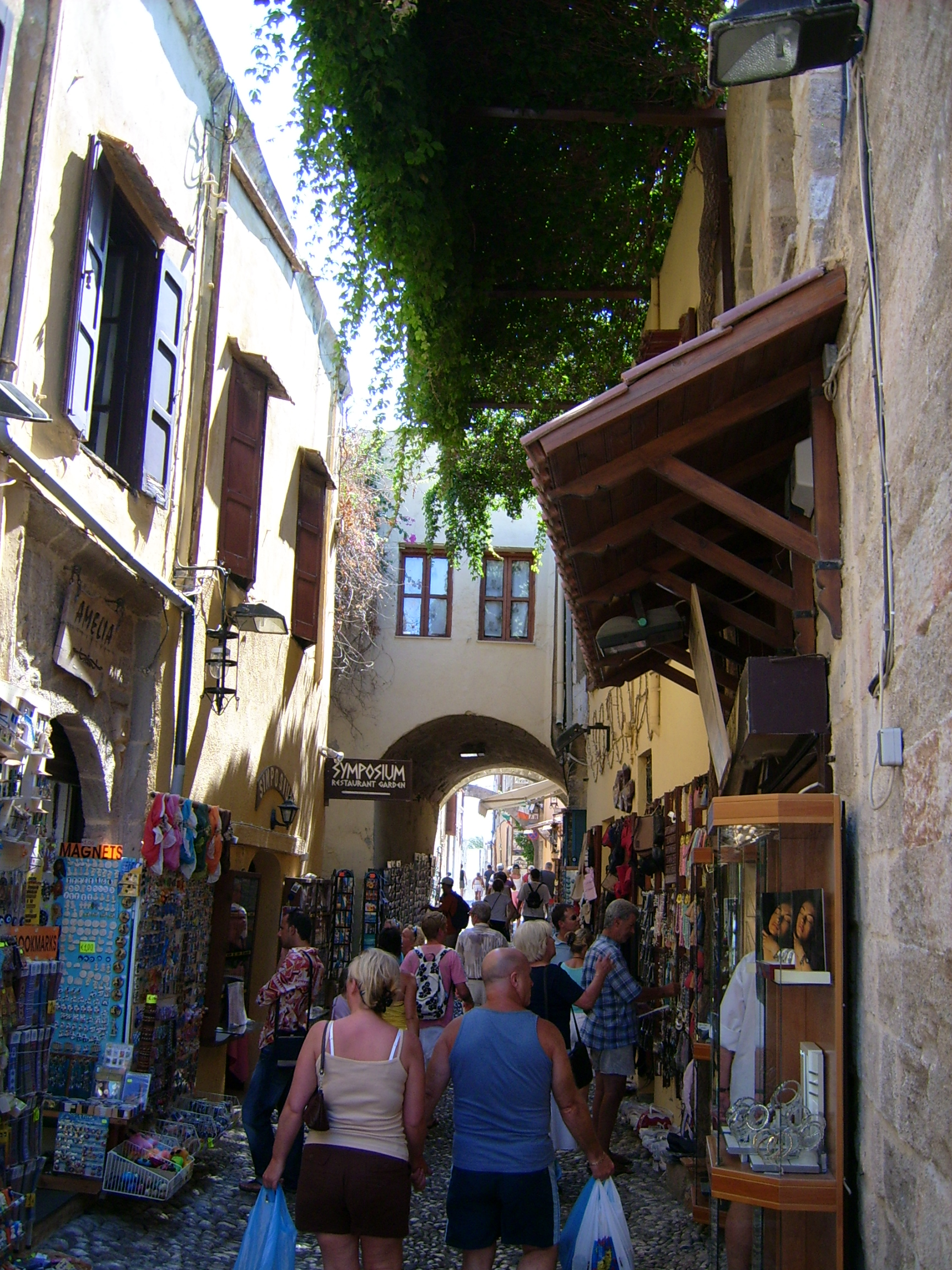 Touristisch bevölkerte Altstadt von Rhodos